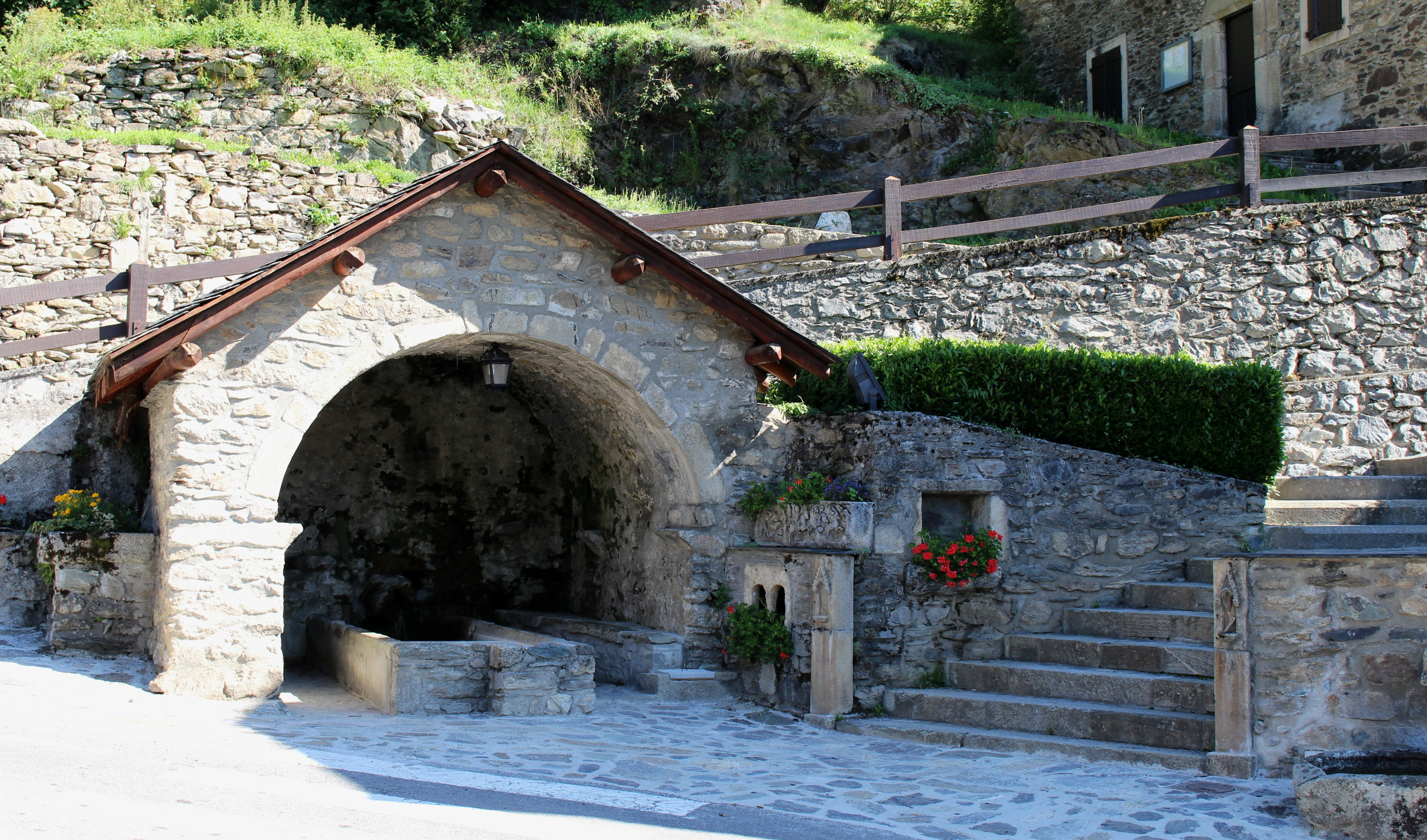 Lavoir de Saint-Lary-Soulan (Hautes-Pyrénées)